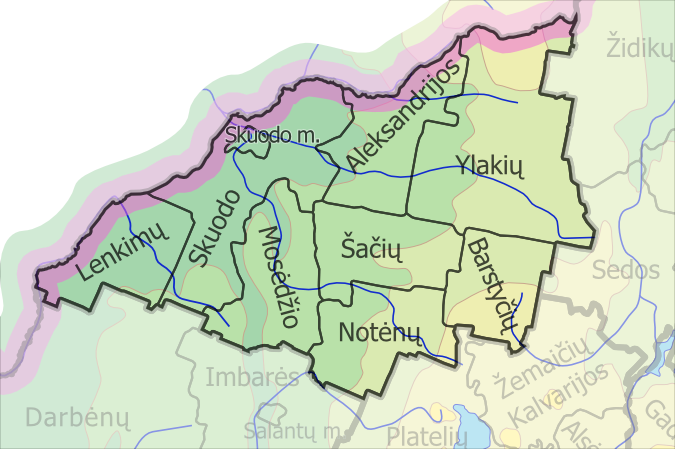 Padaryta iš :image:LietuvosSeniunijos.png